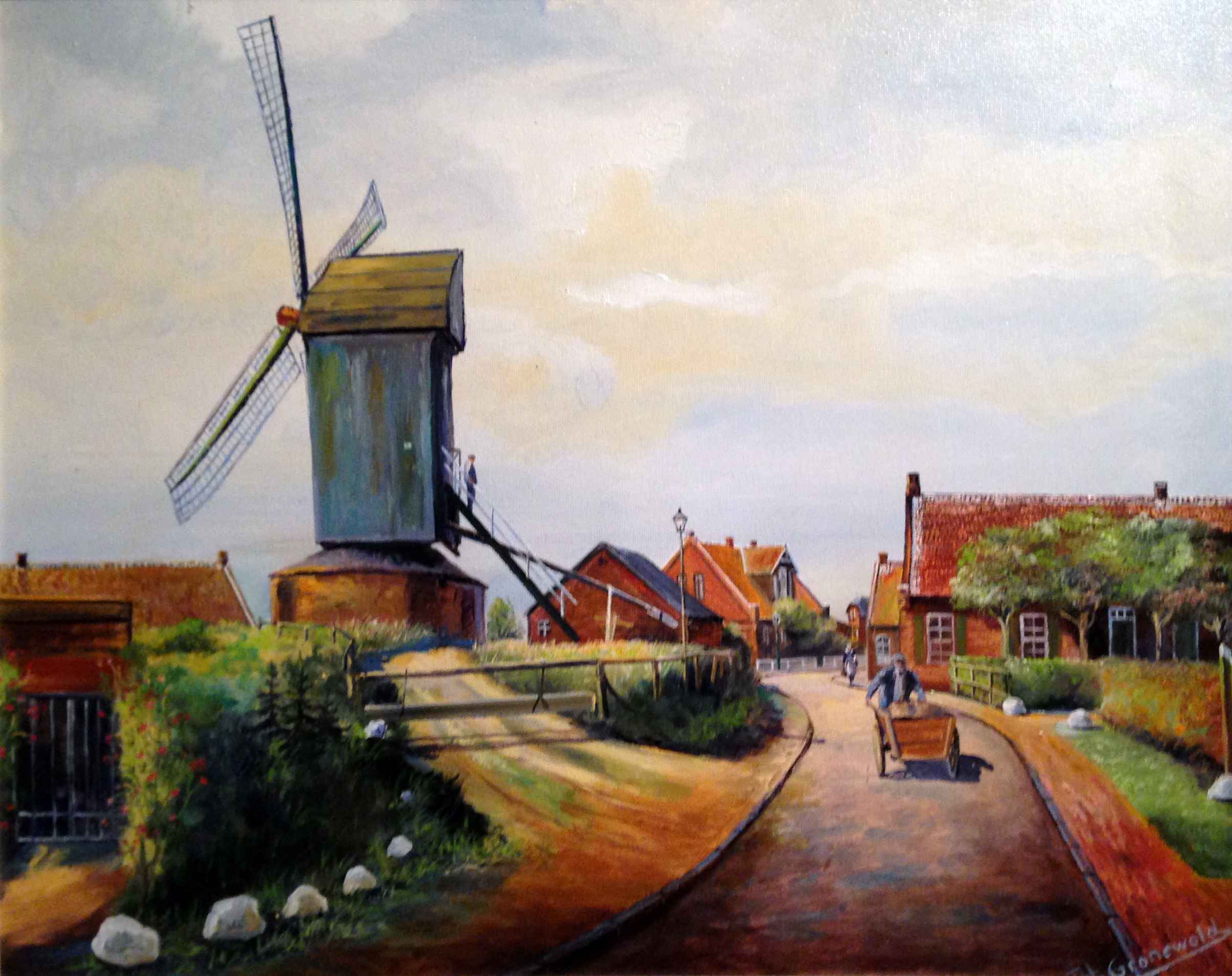 Altes Ölgemälde der Ekeler Mühle in Norden, Ostfriesland, an der Kreuzung Schulstraße / Mühlenstraße